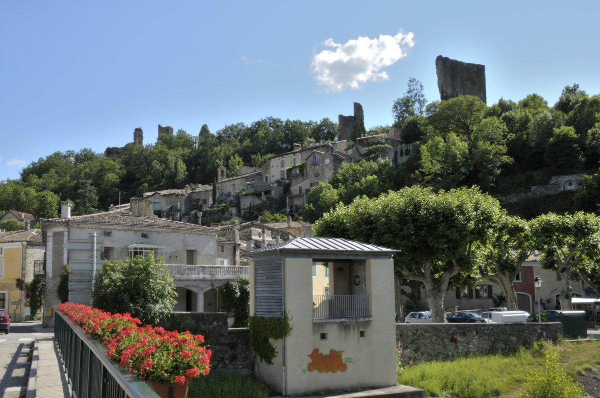 le vieux village